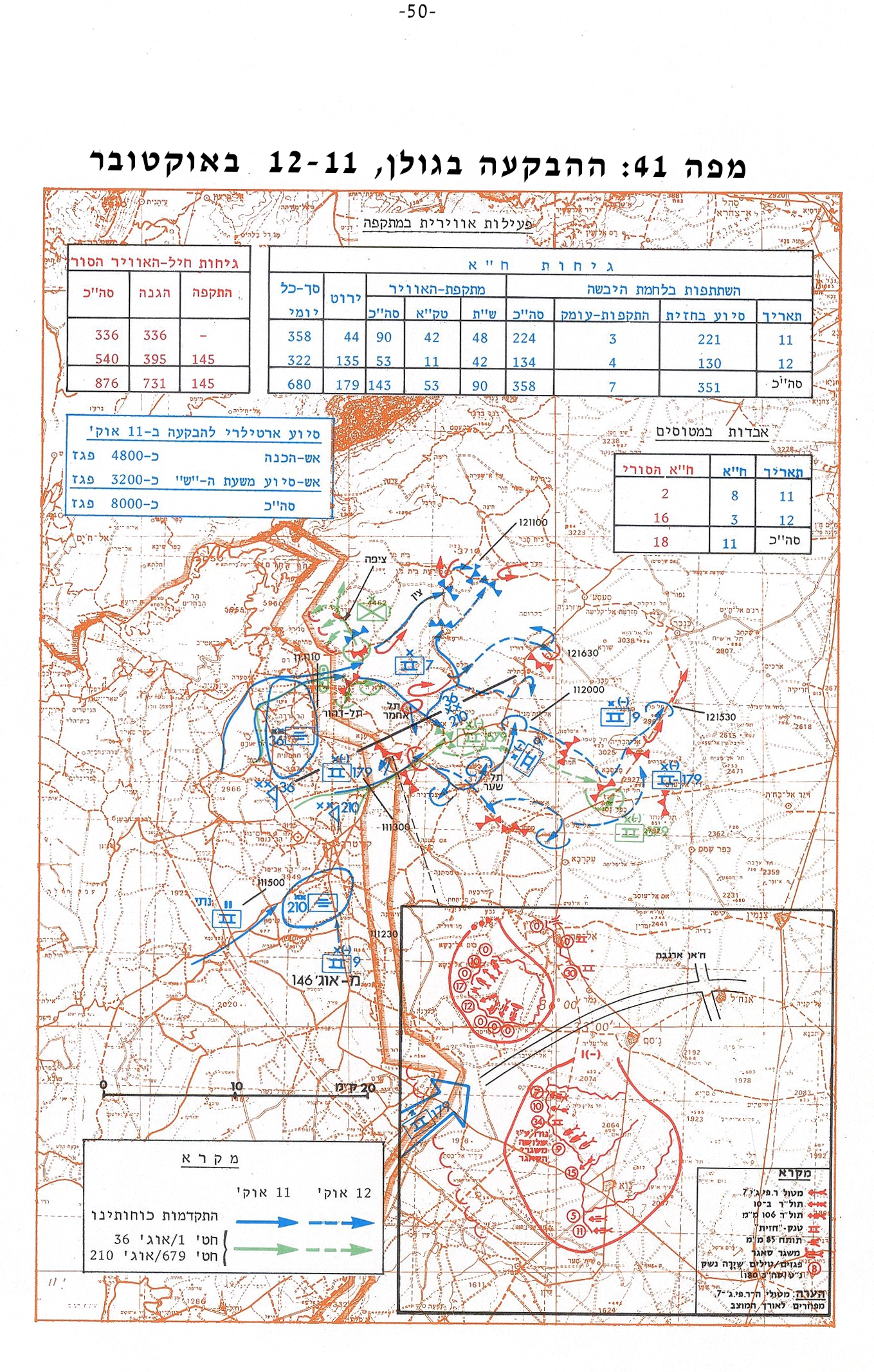 מפה 41 - ההבקעה בגולן, 11-12 לאוקטובר - מלחמת יום הכיפורים